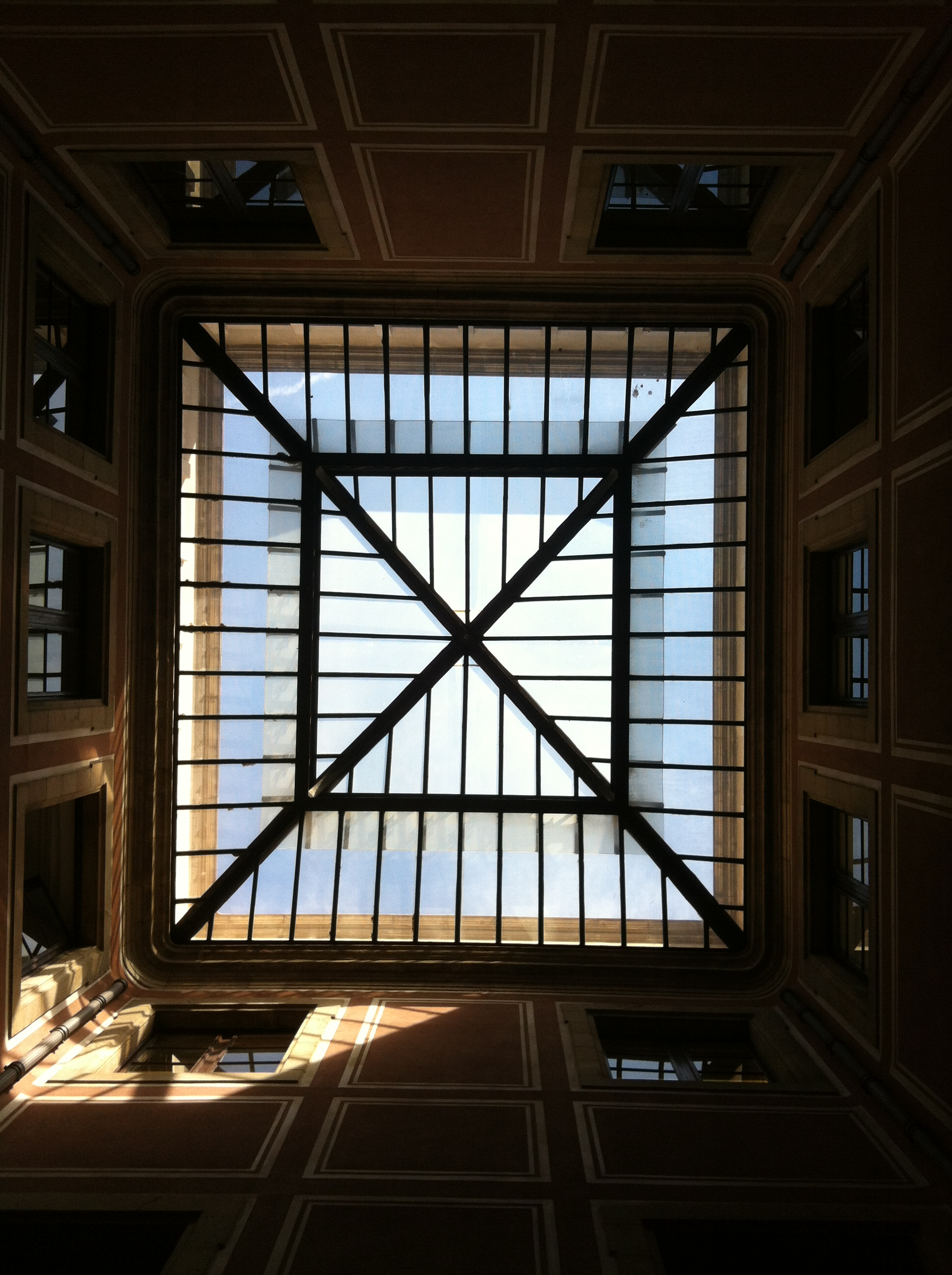 Casa March de Reus (Barcelona)